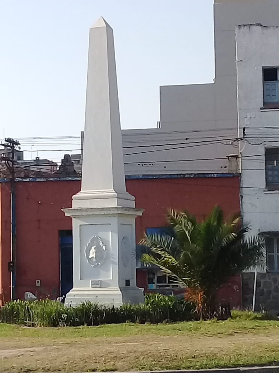 Al valor del pueblo jujeño y al honorable general MANUEL BELGRANO